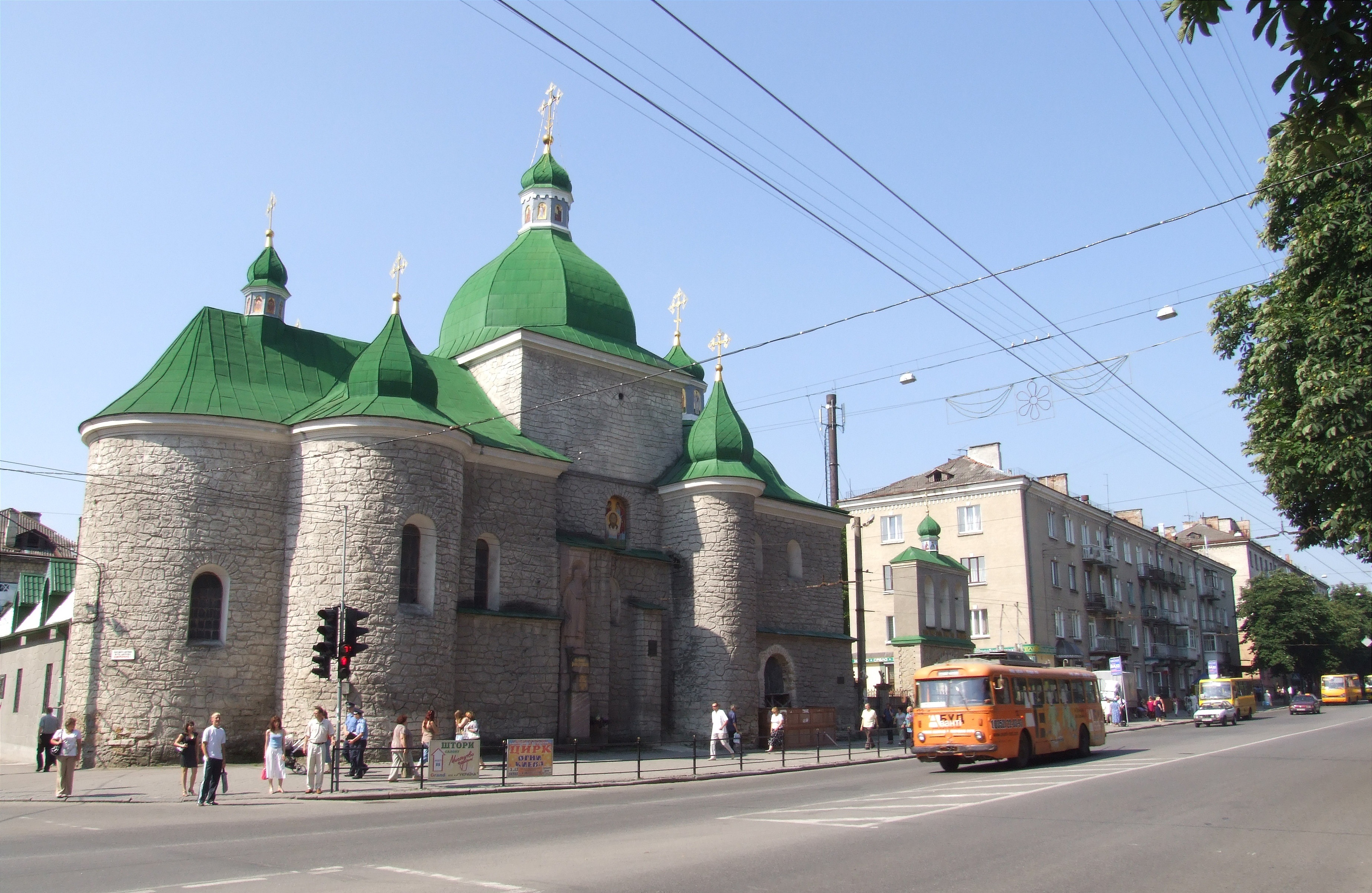 Церква Різдва Христового, Тернопіль, вул. Руська, 22